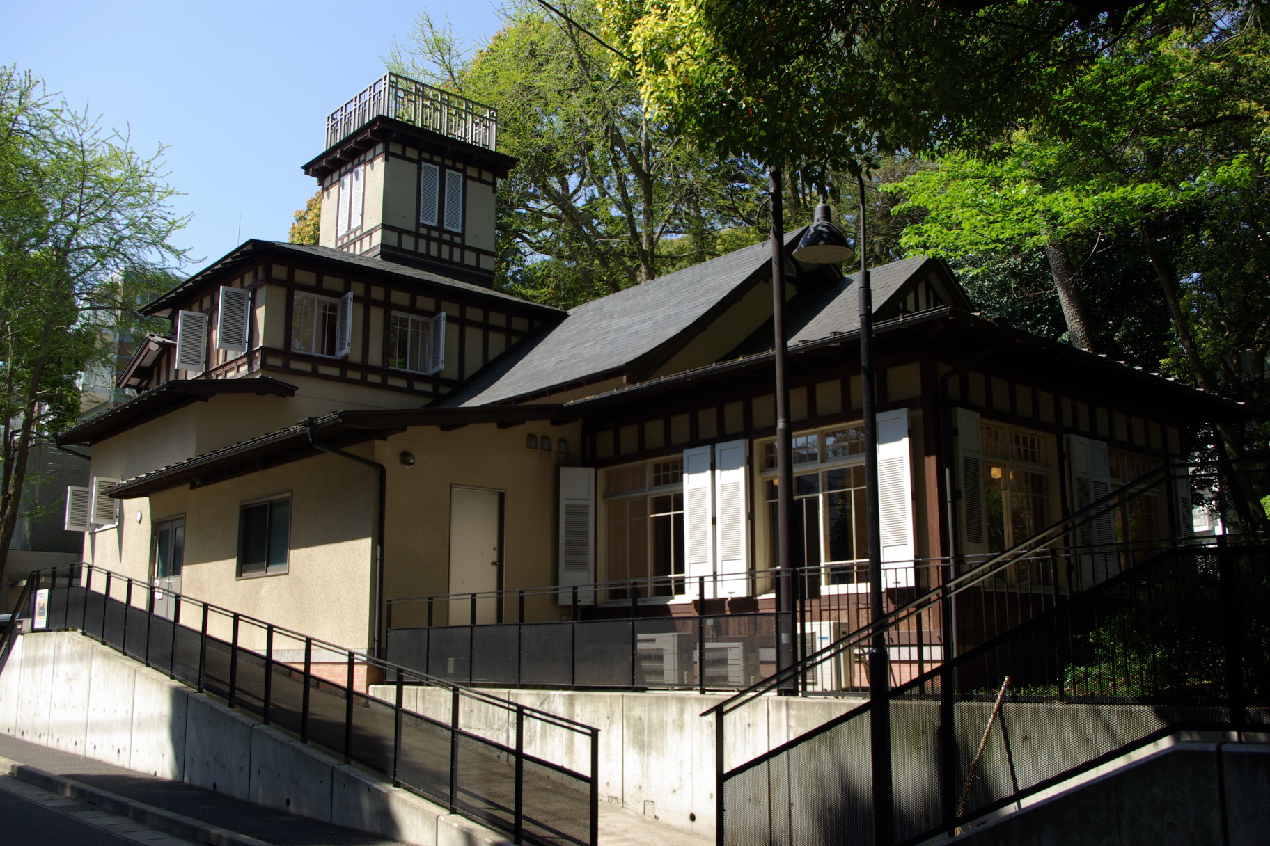 木内ギャラリー（千葉県市川市）